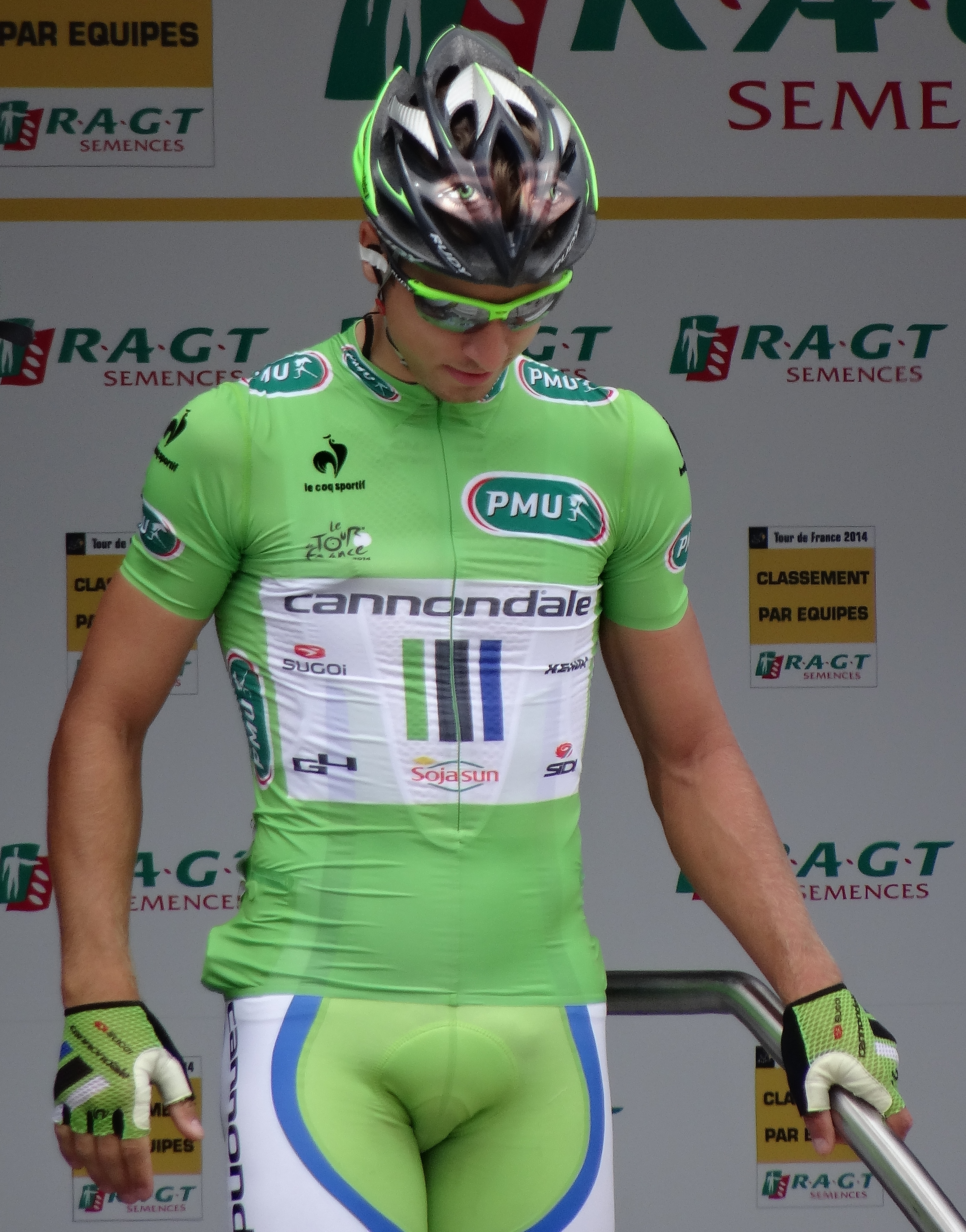 Reportage photographique réalisé le mardi 8 juillet à l'occasion du départ de la quatrième étape du Tour de France 2014 au Touquet-Paris-Plage, Nord-Pas-de-Calais, France.